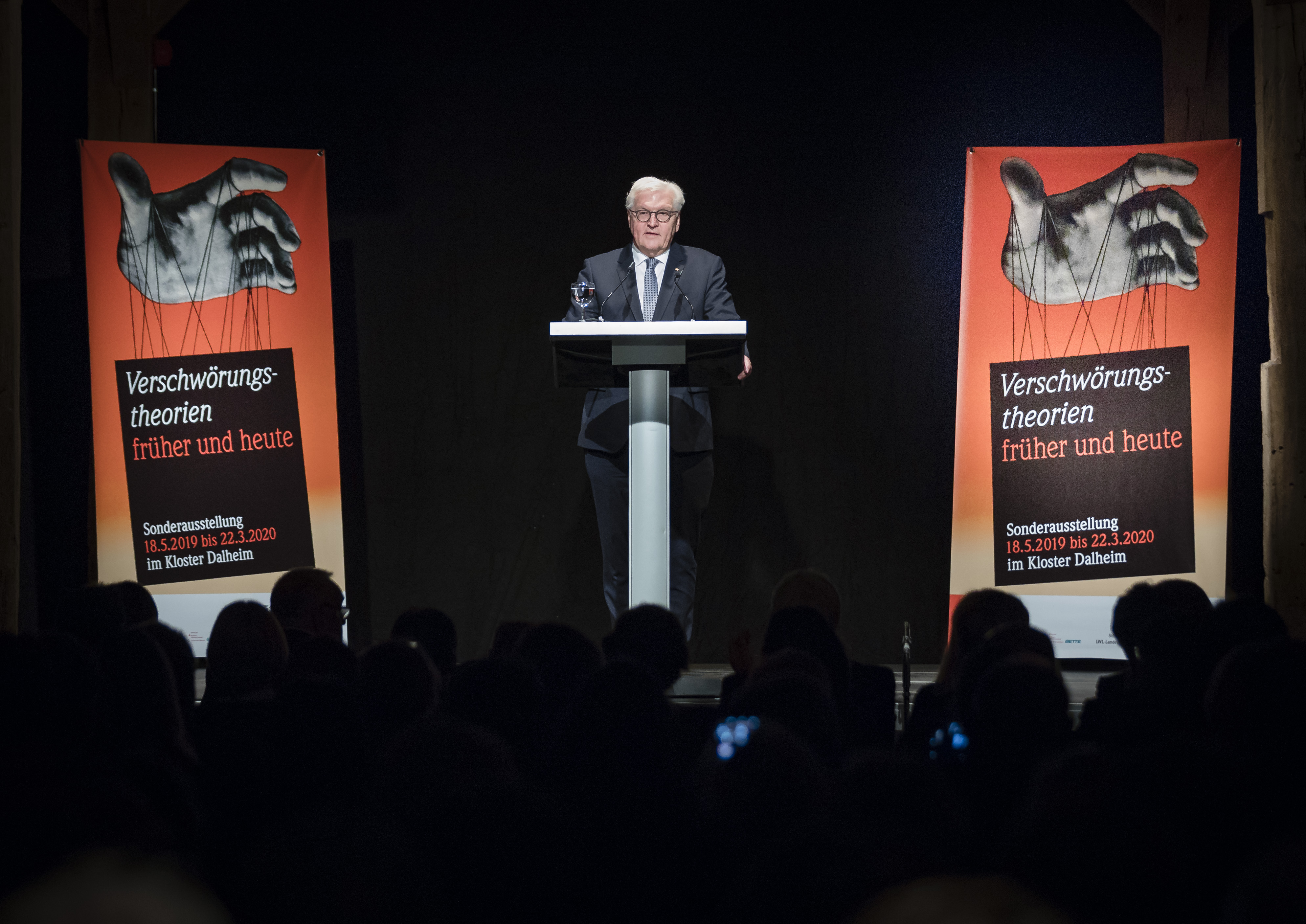 Bundespräsident Frank-Walter Steinmeier bei der Eröffnungsfeier zur Sonderausstellung "Verschwörungstheorien - früher und heute" im Kloster Dalheim. (Foto: LWL/photothek.de/Xander Heinl)